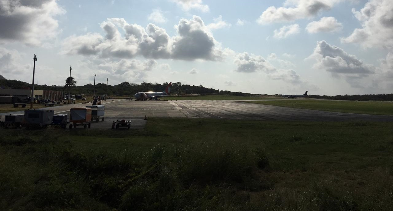 Pátio das aeronaves FEN-SBFN